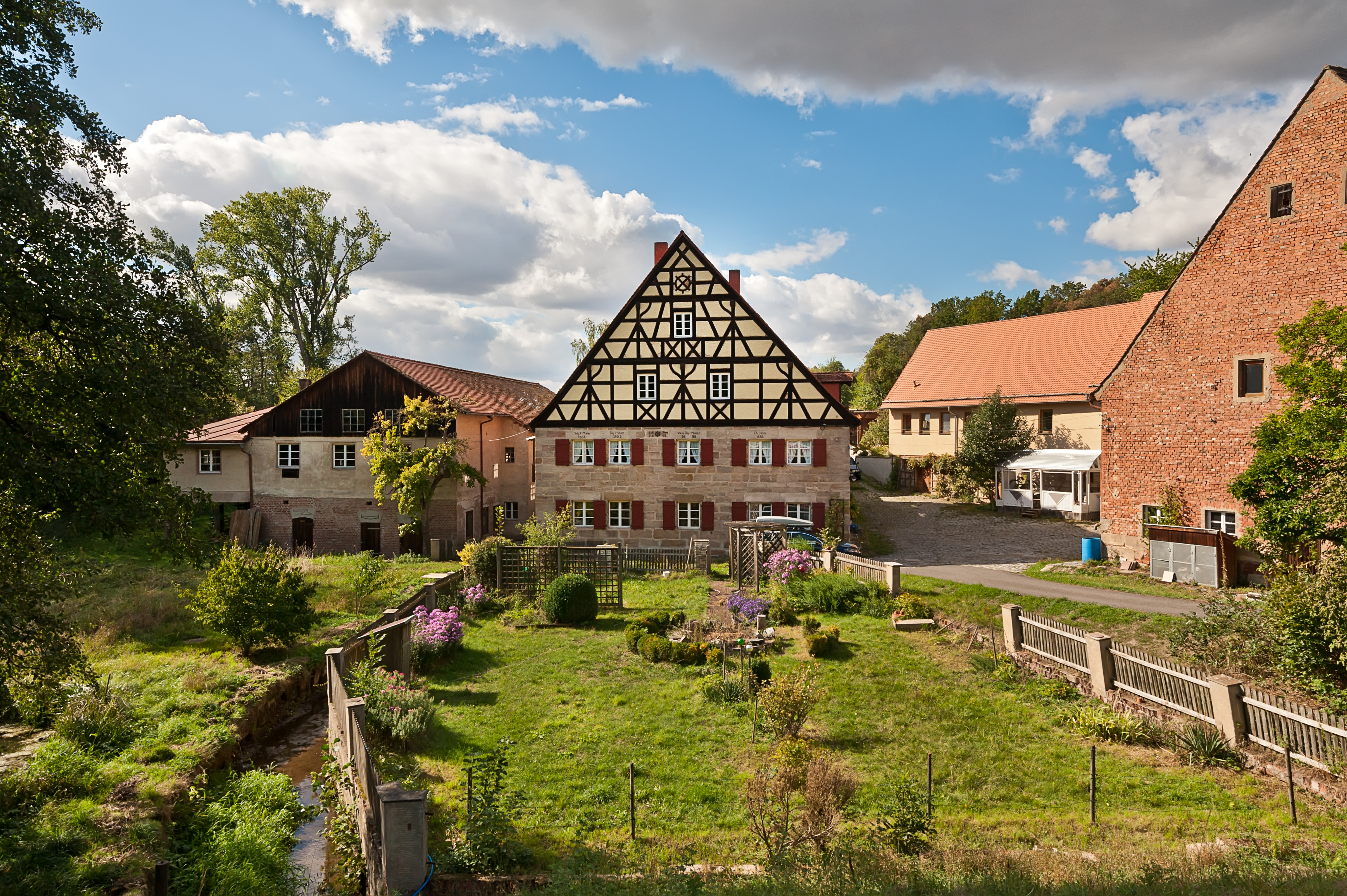 Zweigeschossiger Sandsteinquaderbau mit Satteldach, Aufzugsgaube und Sichtfachwerkgiebel, im frühen 19. Jahrhundert (bezeichnet „1803“ und „1810“) wesentlich ausgebaut, Erneuerungen bezeichnet „1865“, „1905“, „1938“ und „1982“This is a photograph of an architectural monument.